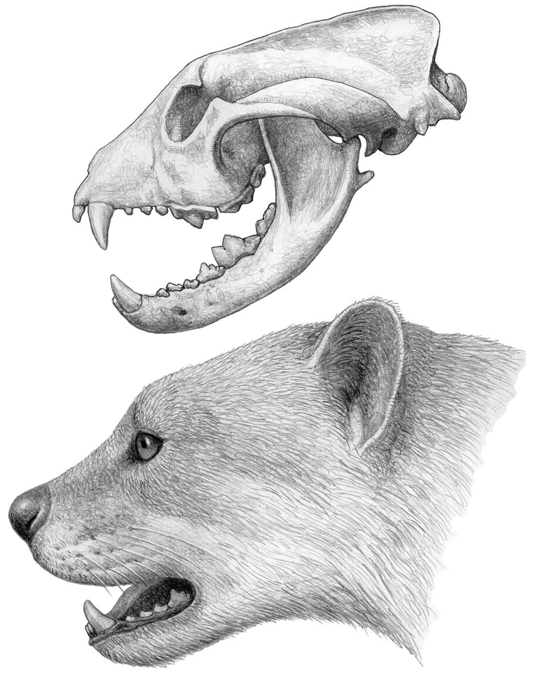 Skull (A) and life appearance (B) of Simocyon batalleri (artwork by M. Antón).